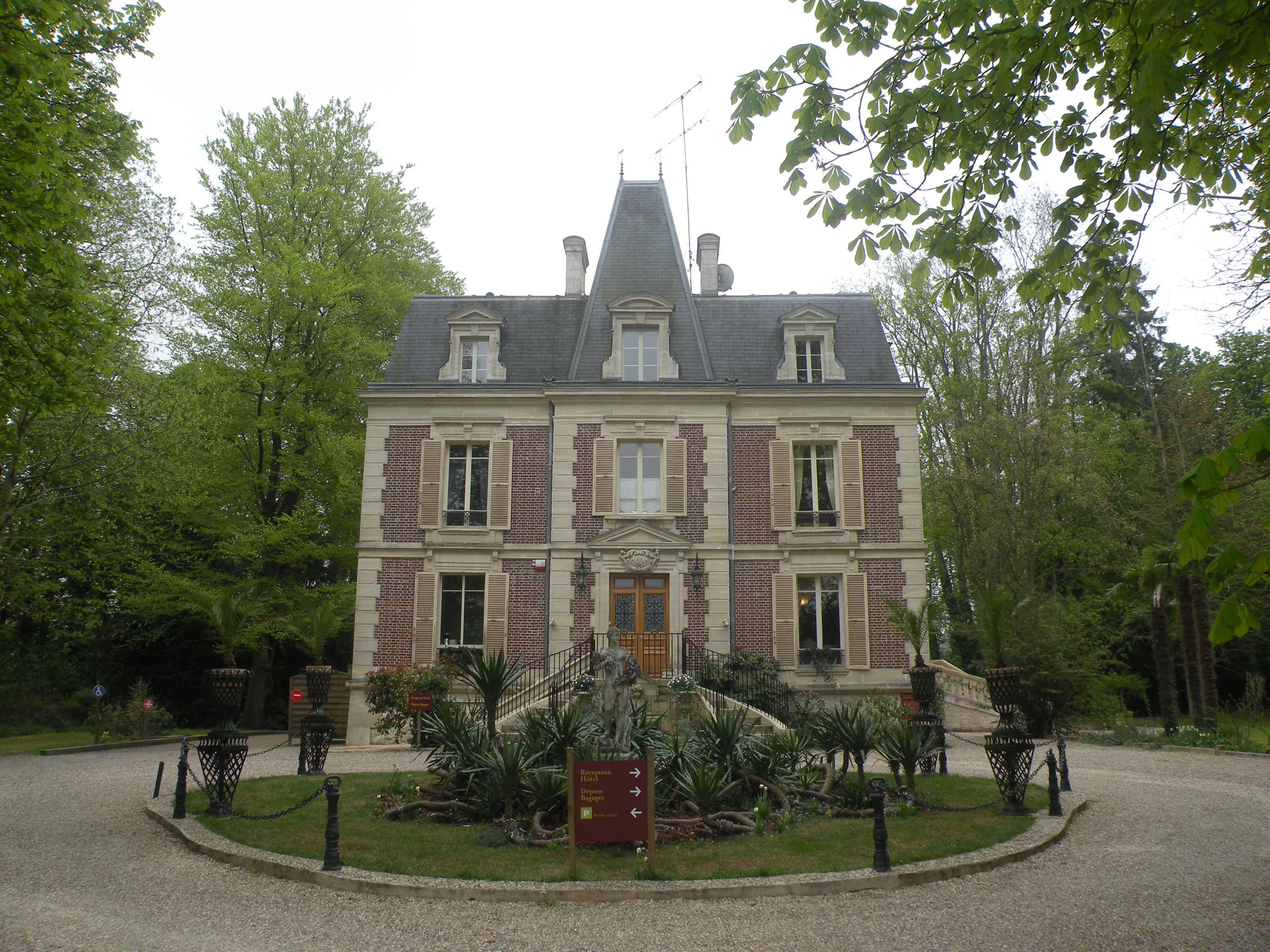 Bray-et-Lû chateau